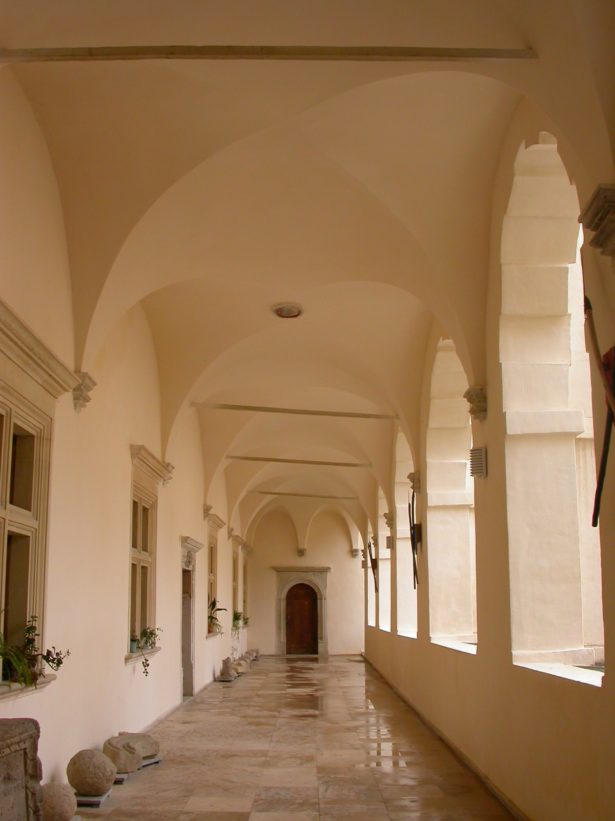 Cetatea Făgăraș, sec. XIV - XVIII